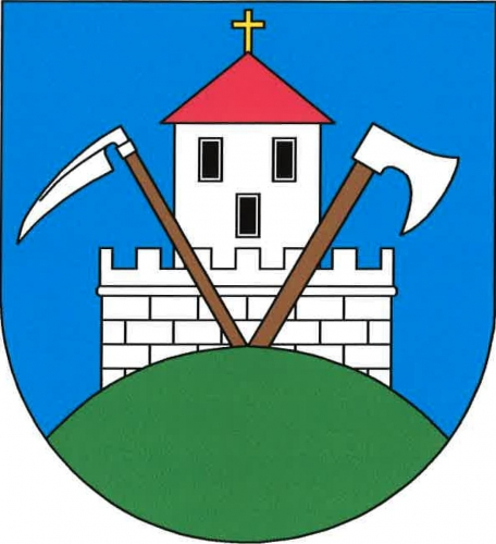 znak, Věžnice, okres Jihlava